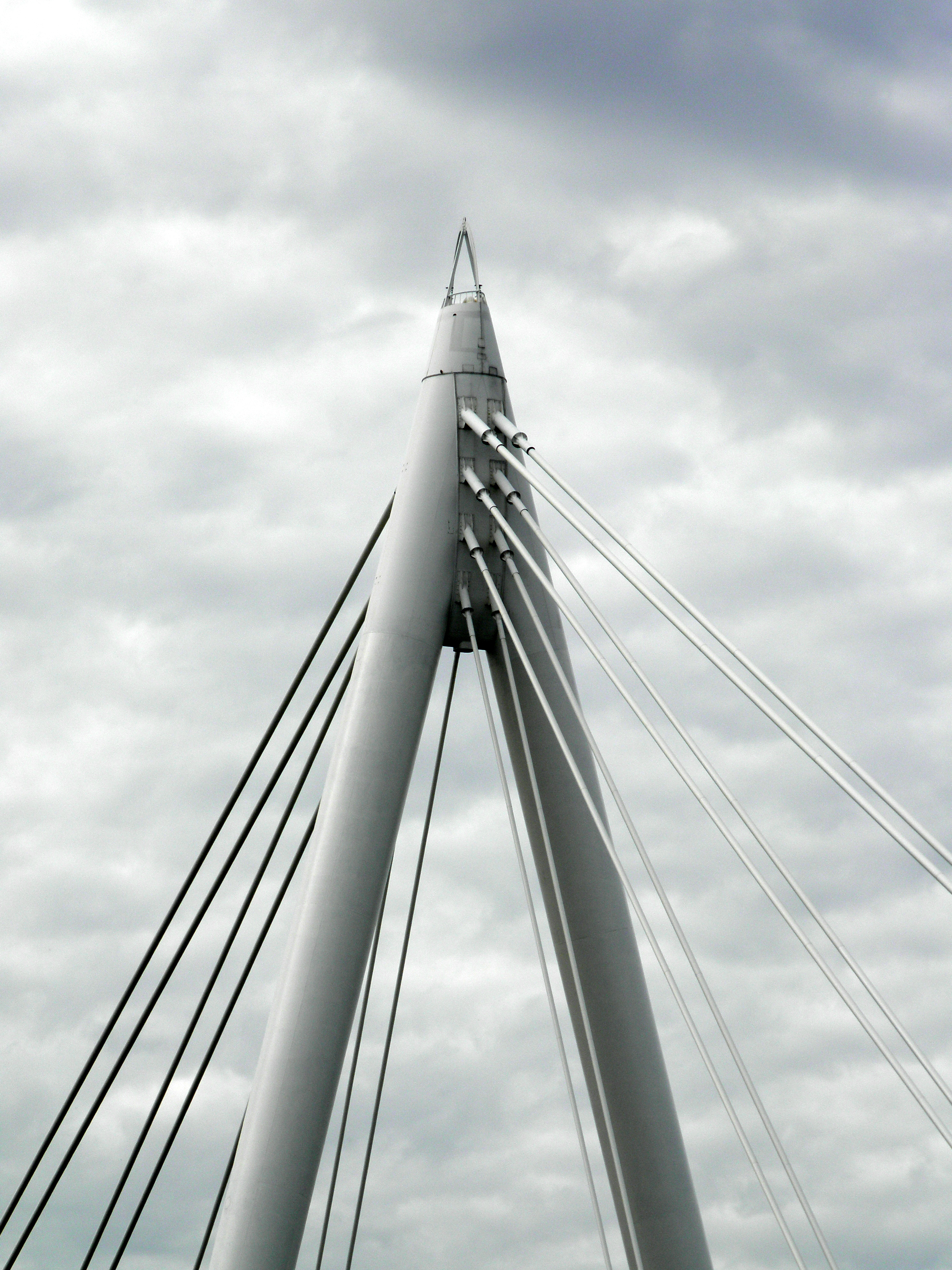 Piacenza d'Adige: Autostrada A31, dettaglio attacco tiranti del pilone nord del ponte strallato sul fiume Adige.